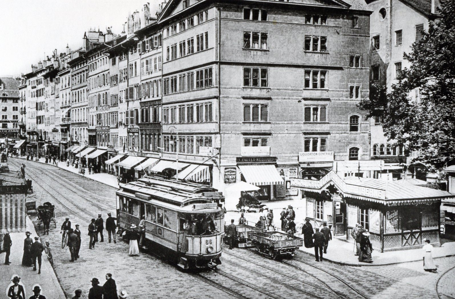 Rue du Marché hauteur place du Molard vers 1900. (Regardez sur la voie de droite, deux petits wagons pour le transport de marchandises)